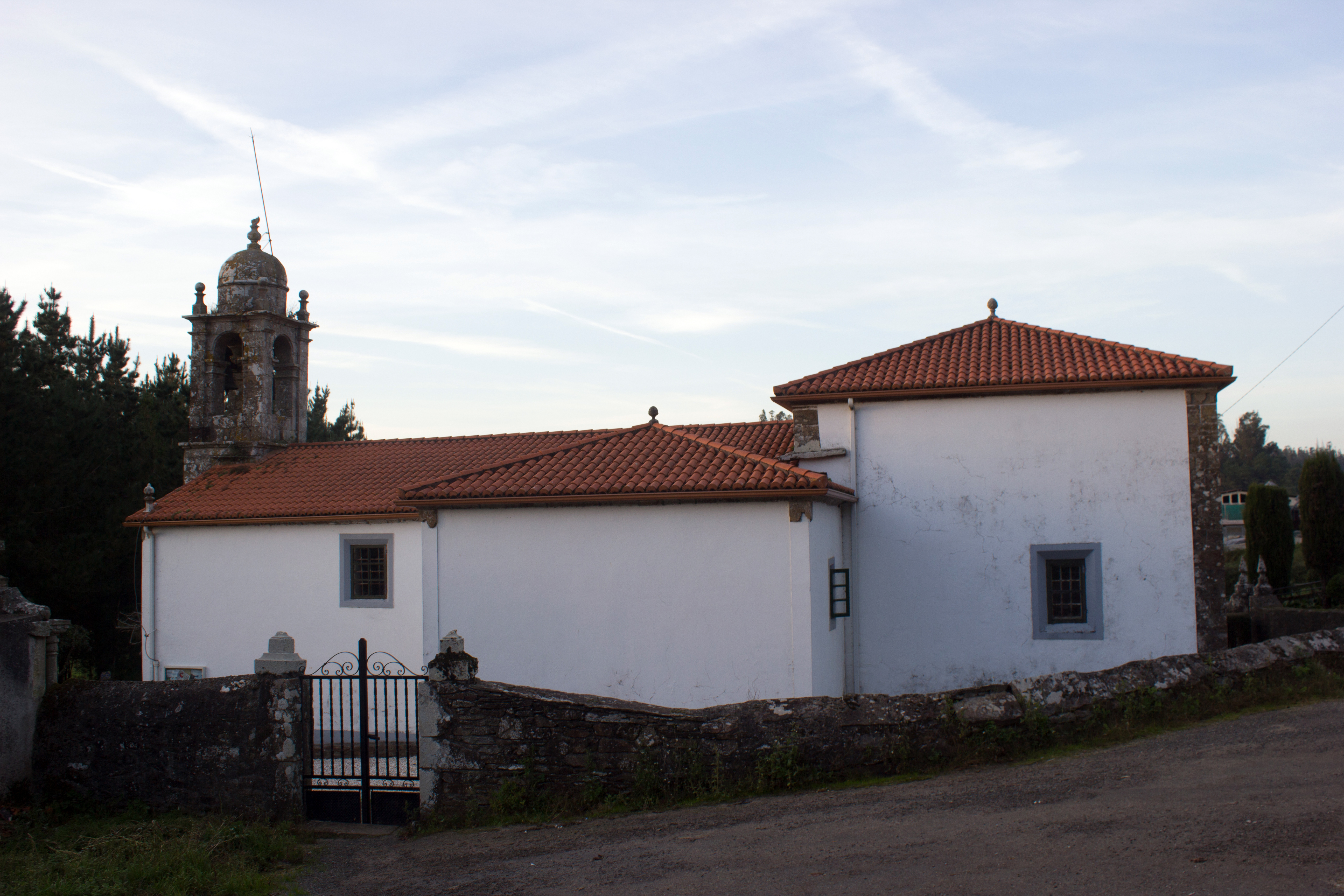 Igrexa de San Cristovo de Beseño, no concello de Touro.